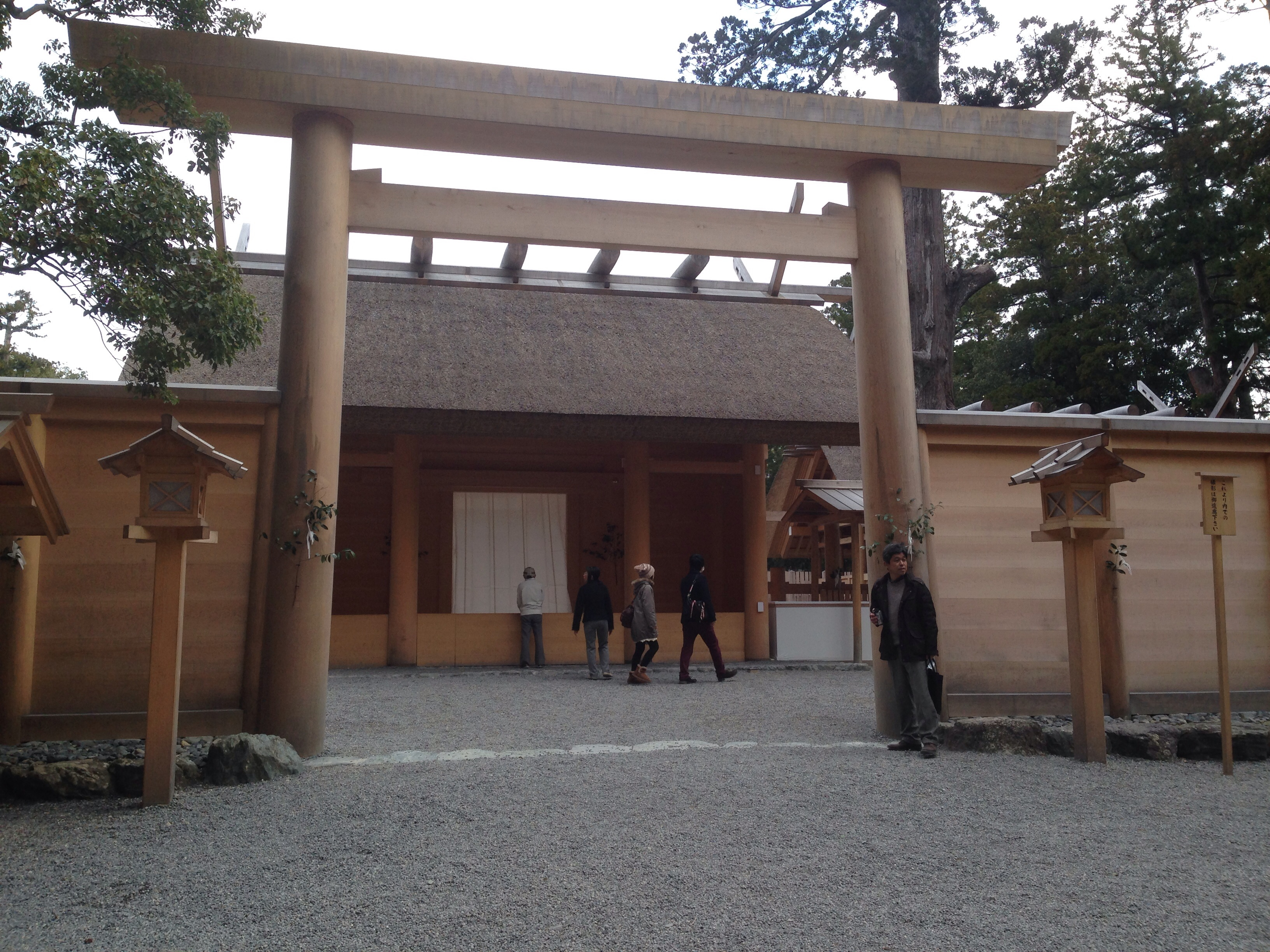 伊勢神宮外宮の2013年（平成25年）の式年遷宮による新社殿。